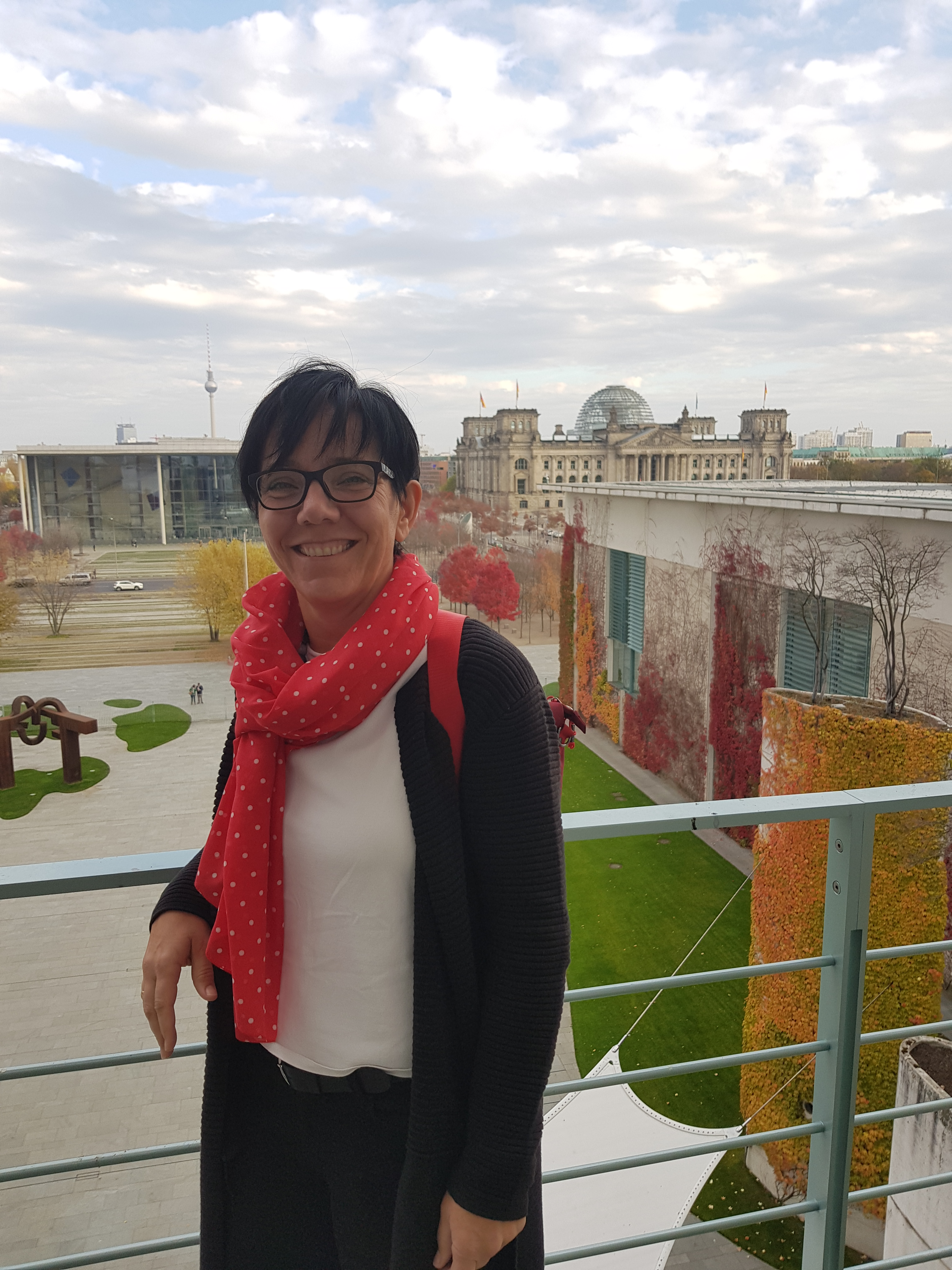 Isabelle Jänchen (2018) auf dem Balkon des Kanzleramtes in Berlin